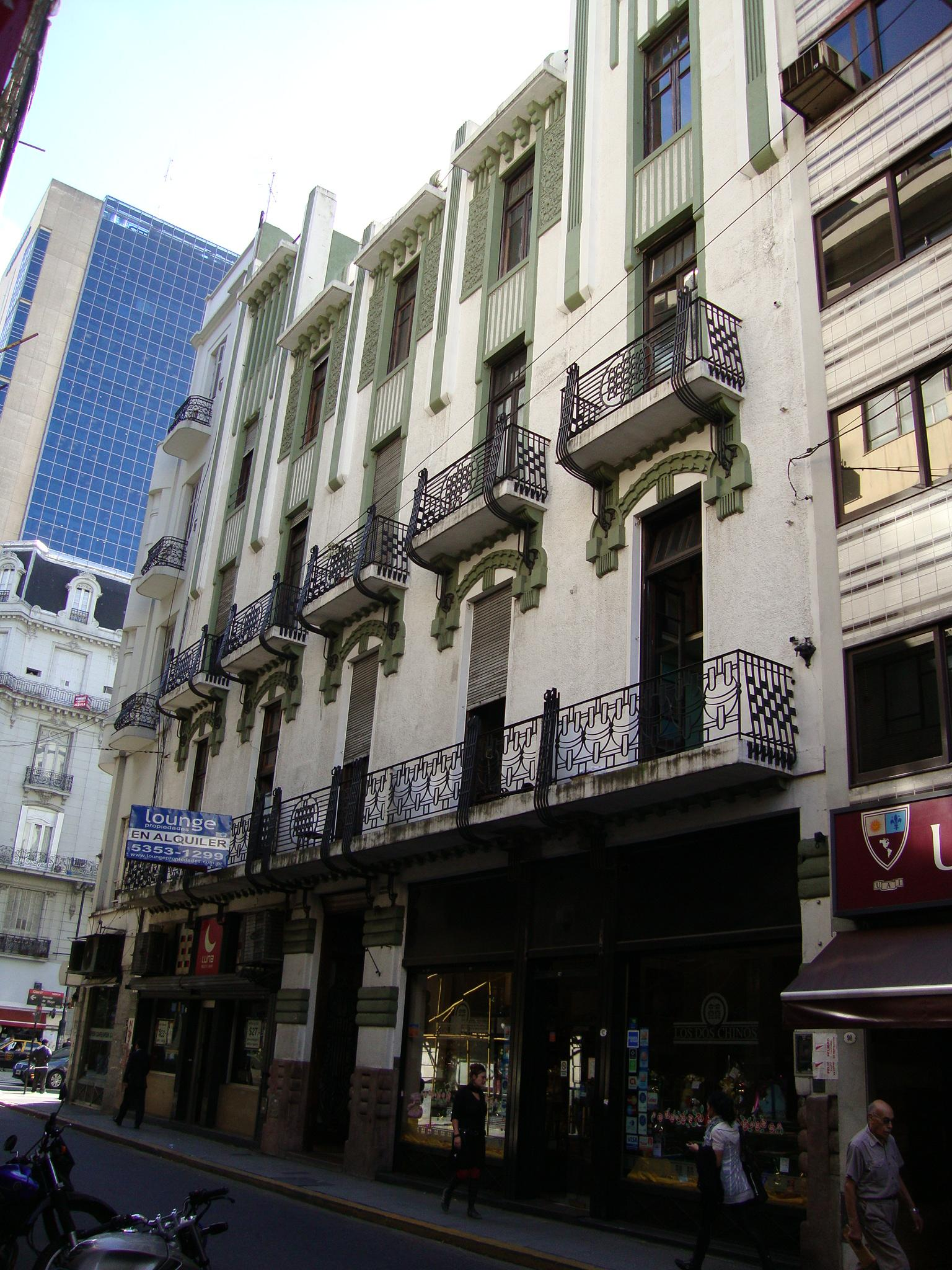 Edificio de oficinas en Chacabuco 78, realizado en estilo modernista catalán por el arquitecto Julián García Núñez, año 1910. Buenos Aires, Argentina.